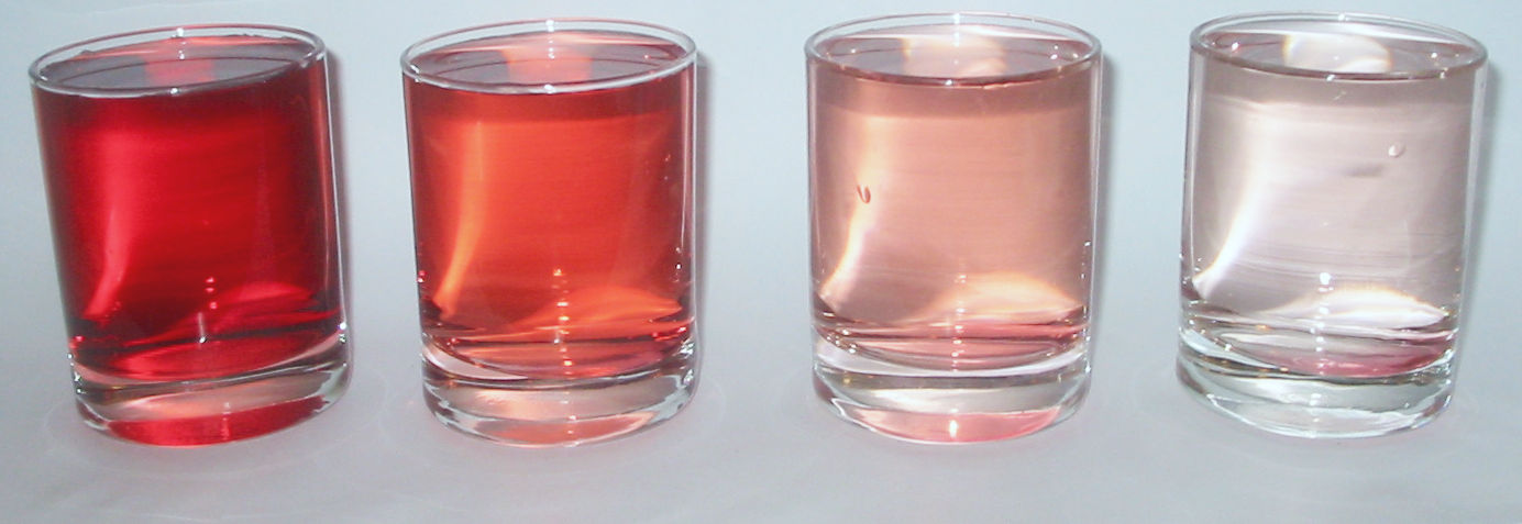 grenadine à différentes dilutions auteur = Thierry Le Ridant